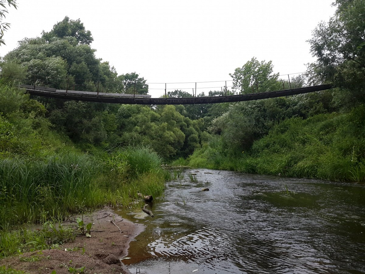 Хмяльнік. Падвясны мост цераз р. Крывінка